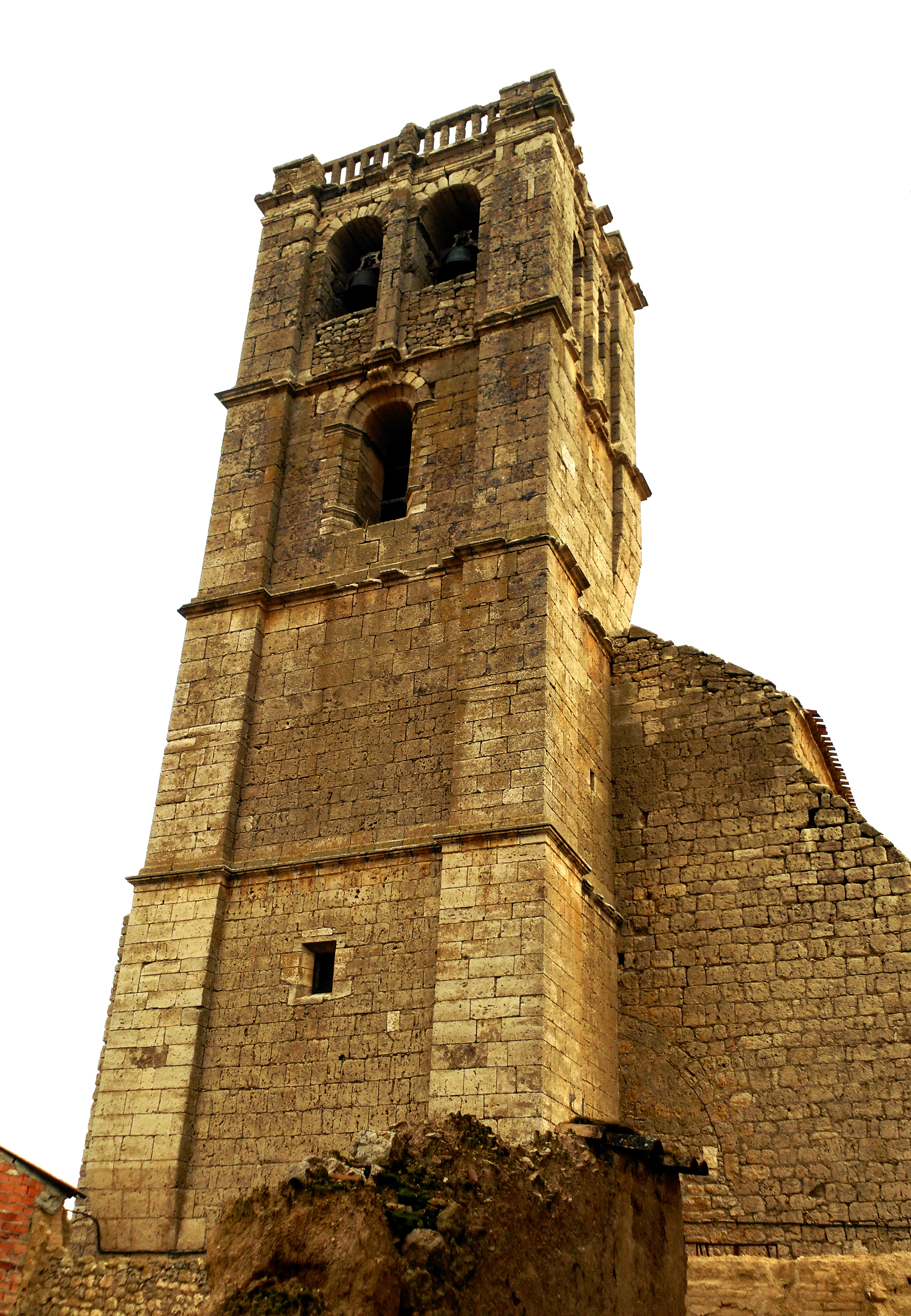 Iglesia parroquial de San Vicente Mártir en Valdenebro de los Valles (Valladolid), torre.